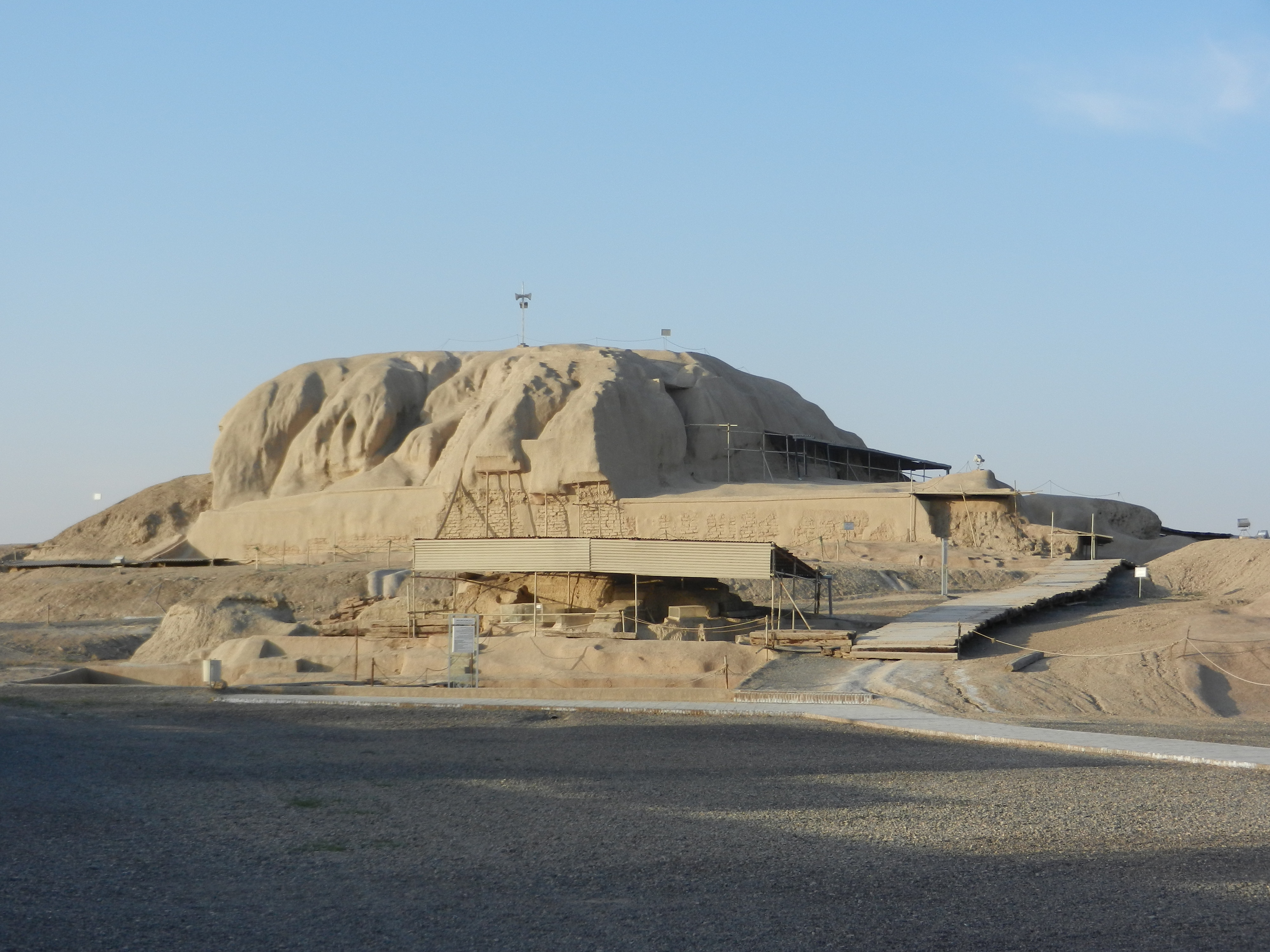 Tepe Sialk, arheološko najdišče v Kashanu, Iran.